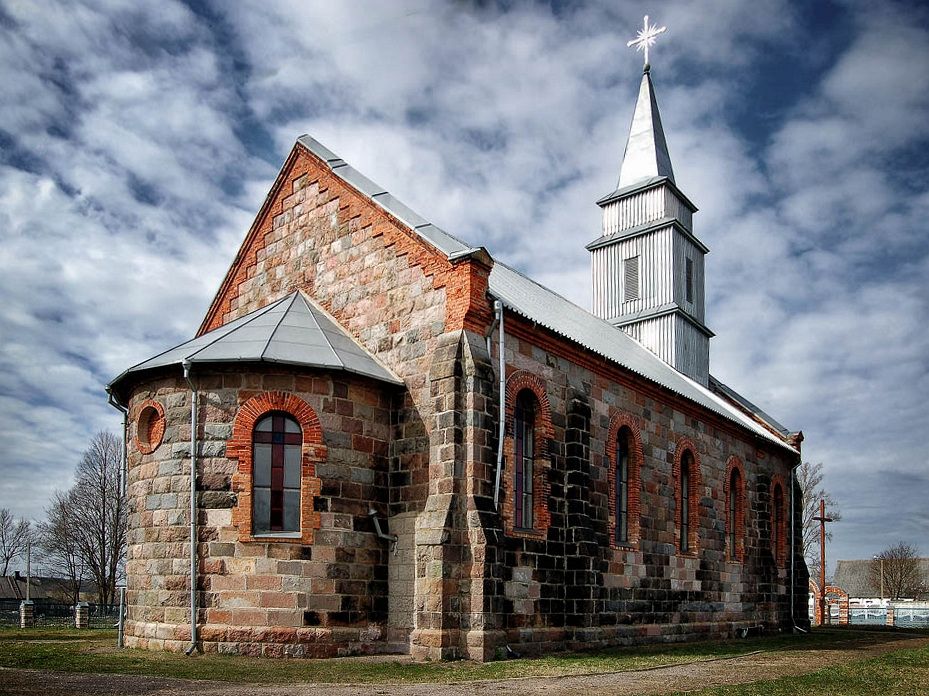 Беларуская (тарашкевіца): Касьцёл Найсьвяцейшага Сэрца Пана Езуса ў вёсцы Ільля